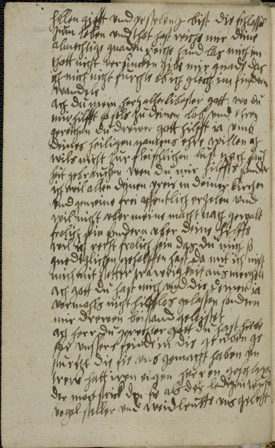 Codex Palatinus germanicus 9, Blatt 2v - Andachtsbuch der Pfalzgräfin Elisabeth von Pfalz-Lautern (1552–1590)